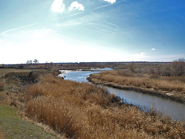 Стерех у села Липовка